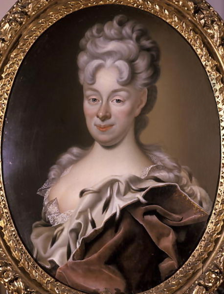 Magdalena Sibylla von Sachsen-Weißenfels (1673–1726), Herzogin von Sachsen-Eisenach